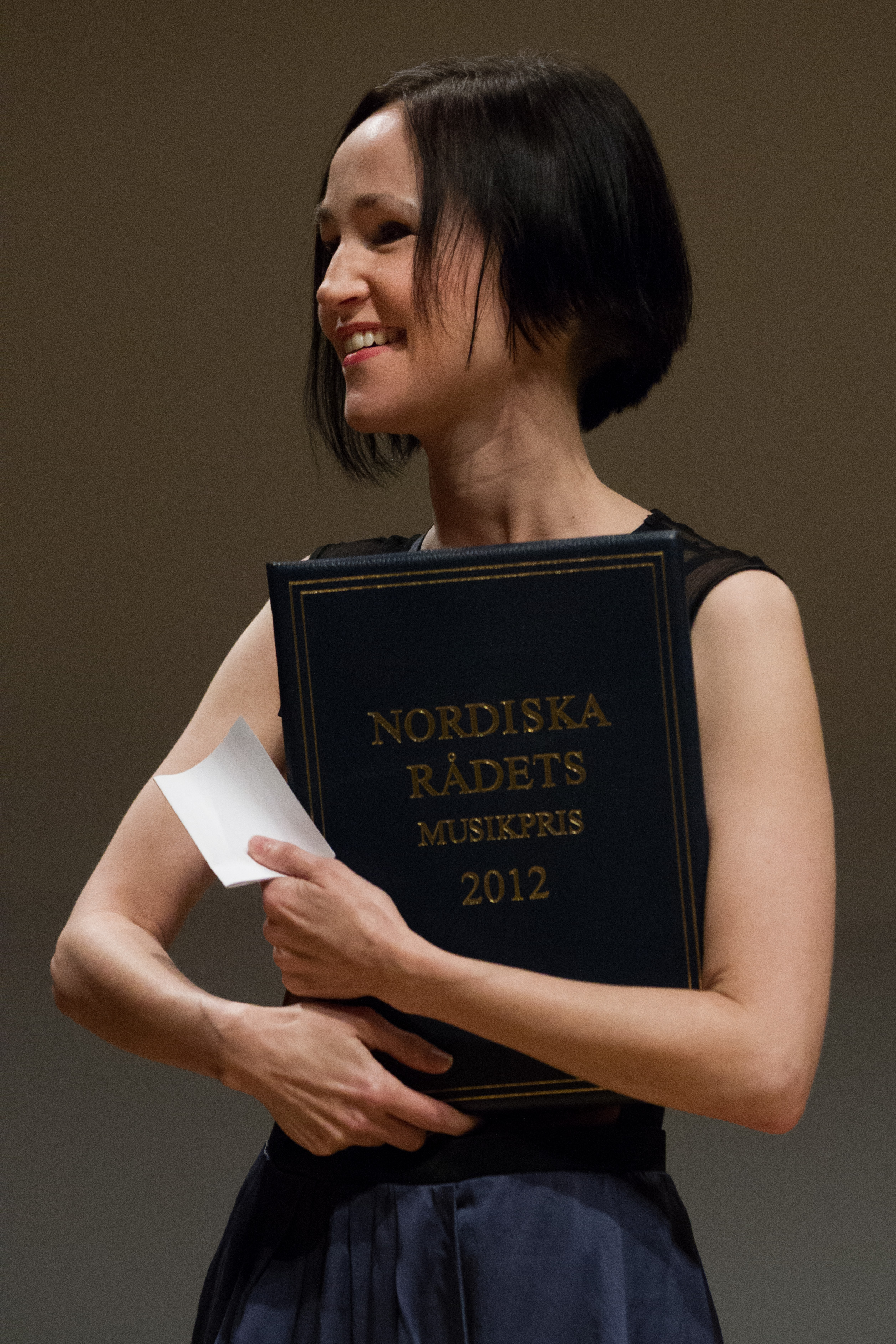 Anna Thorvaldsdóttir . Prisutdelning vid Nordiska råŒdets session i Helsingfors 2012.